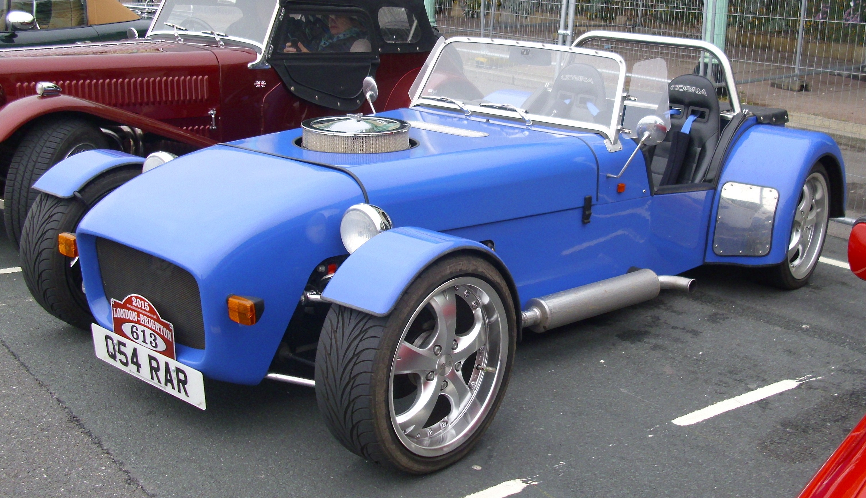 Tornado Raptor 2003